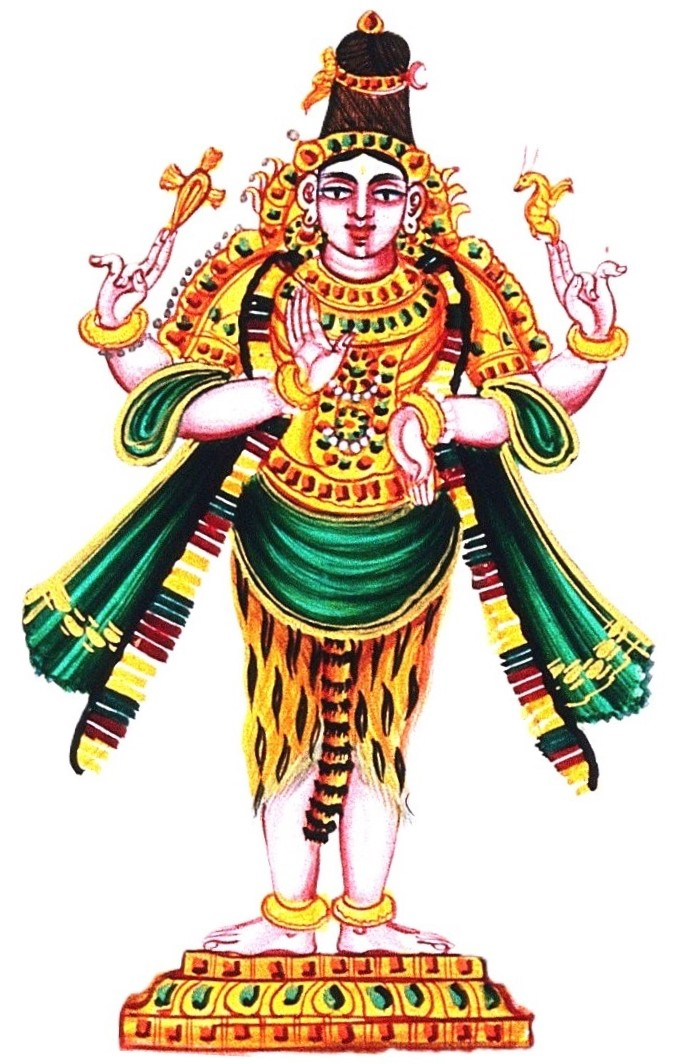 shiva